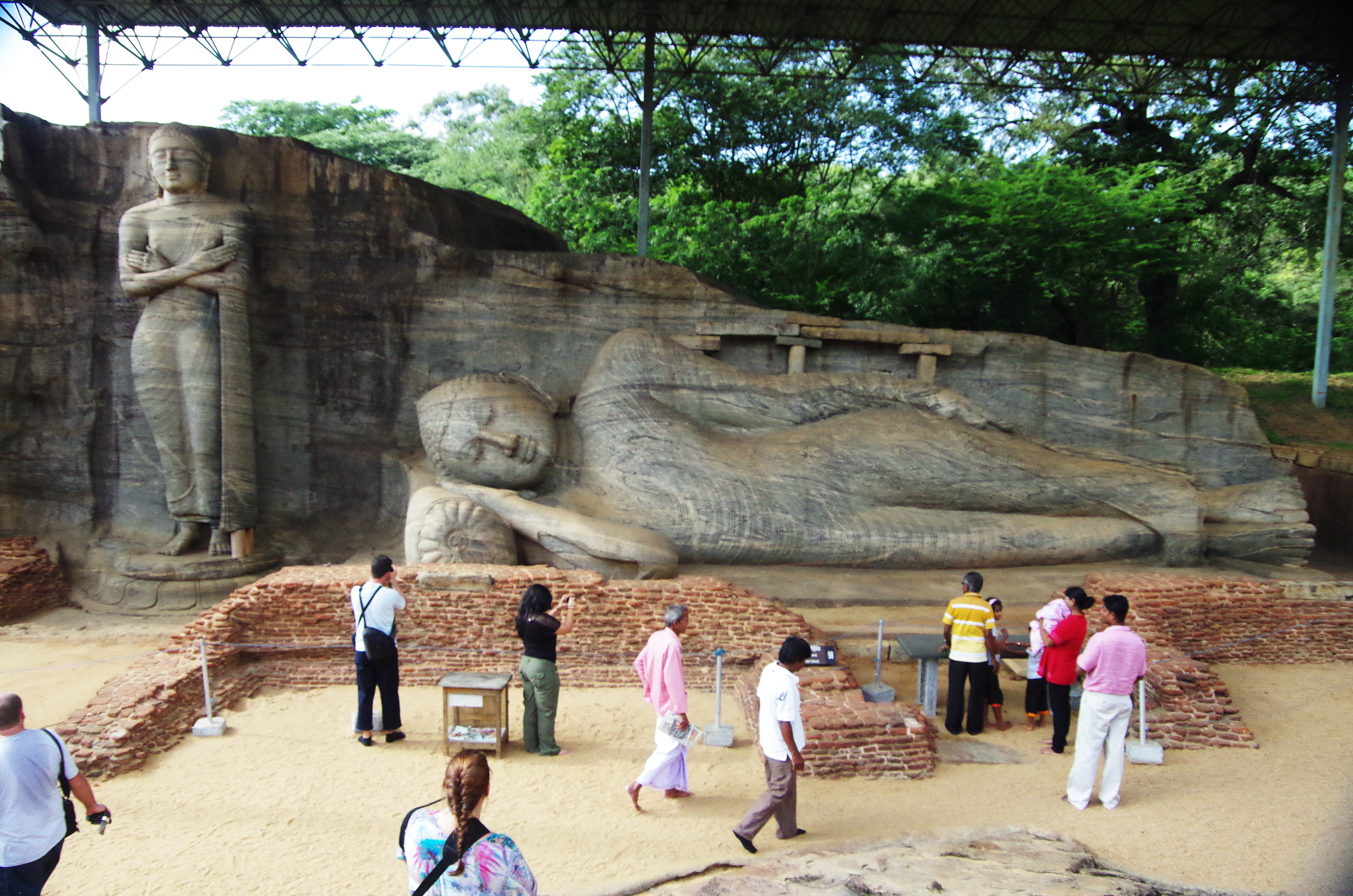 Gal Viharaya